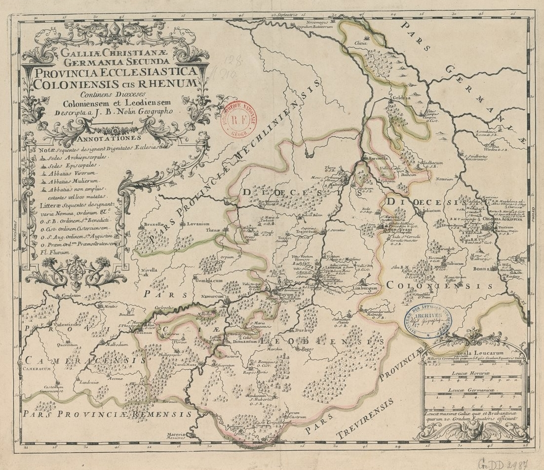 Carte de l'ancienne province ecclésiastique de Cologne, insérée dans la Gallia Christiana (1715/1759).